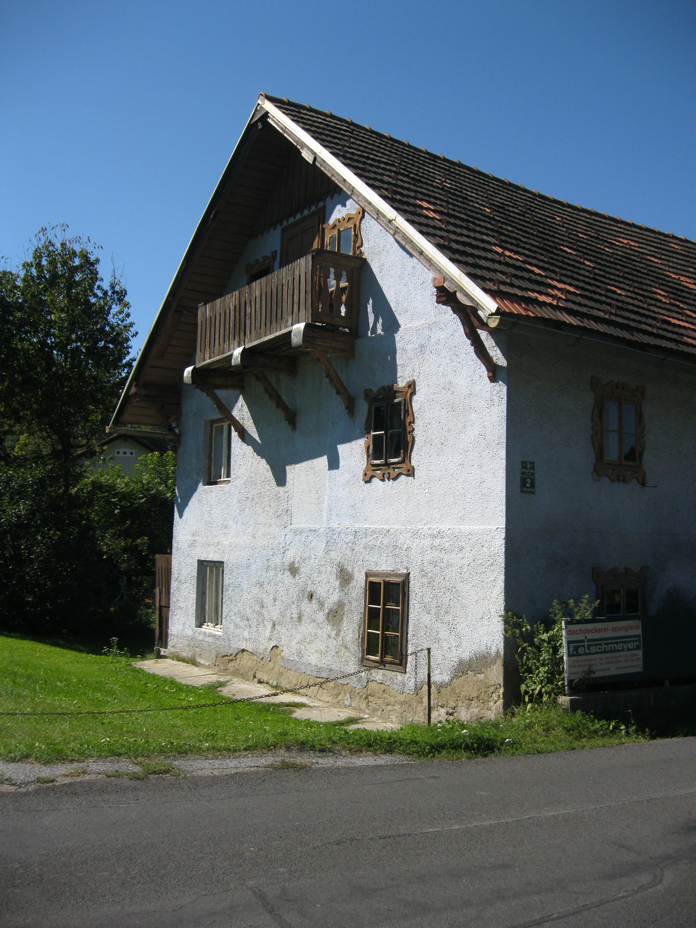 Keusche in Großlobming, Steiermark, Lobmingerstraße 2 Dieses Foto wurde im Rahmen des von Wikimedia Österreich unterstützten Projekts Wiki takes oberes Murtal erstellt. The making of this work was supported by Wikimedia Austria. For other files made with the support of Wikimedia Austria, please see the category Supported by Wikimedia Österreich. Object location47° 10′ 58.44″ N, 14° 48′ 29.3″ E